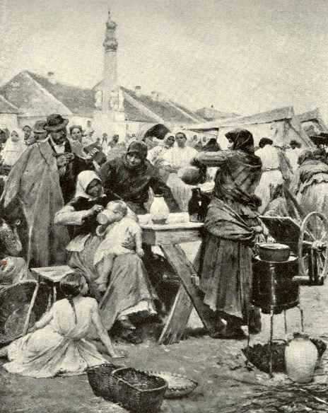 Lacikonyha